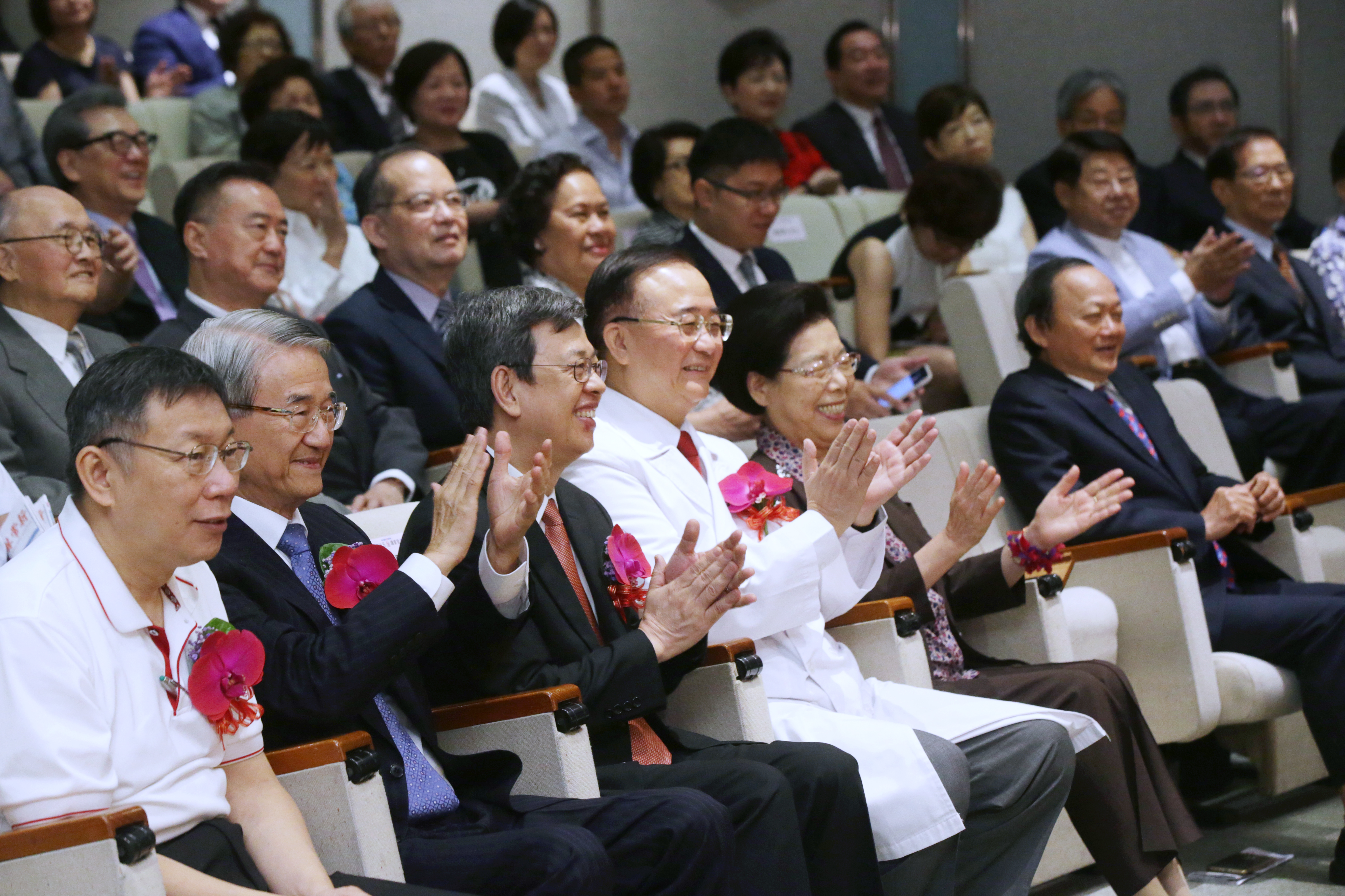 中文（台灣）: 中華民國副總統陳建仁（前排左三）、臺北市市長柯文哲（前排左一）、監察院院長張博雅（前排右二）、前行政院衛生署署長葉金川（前排右一）出席新光醫院25週年院慶。